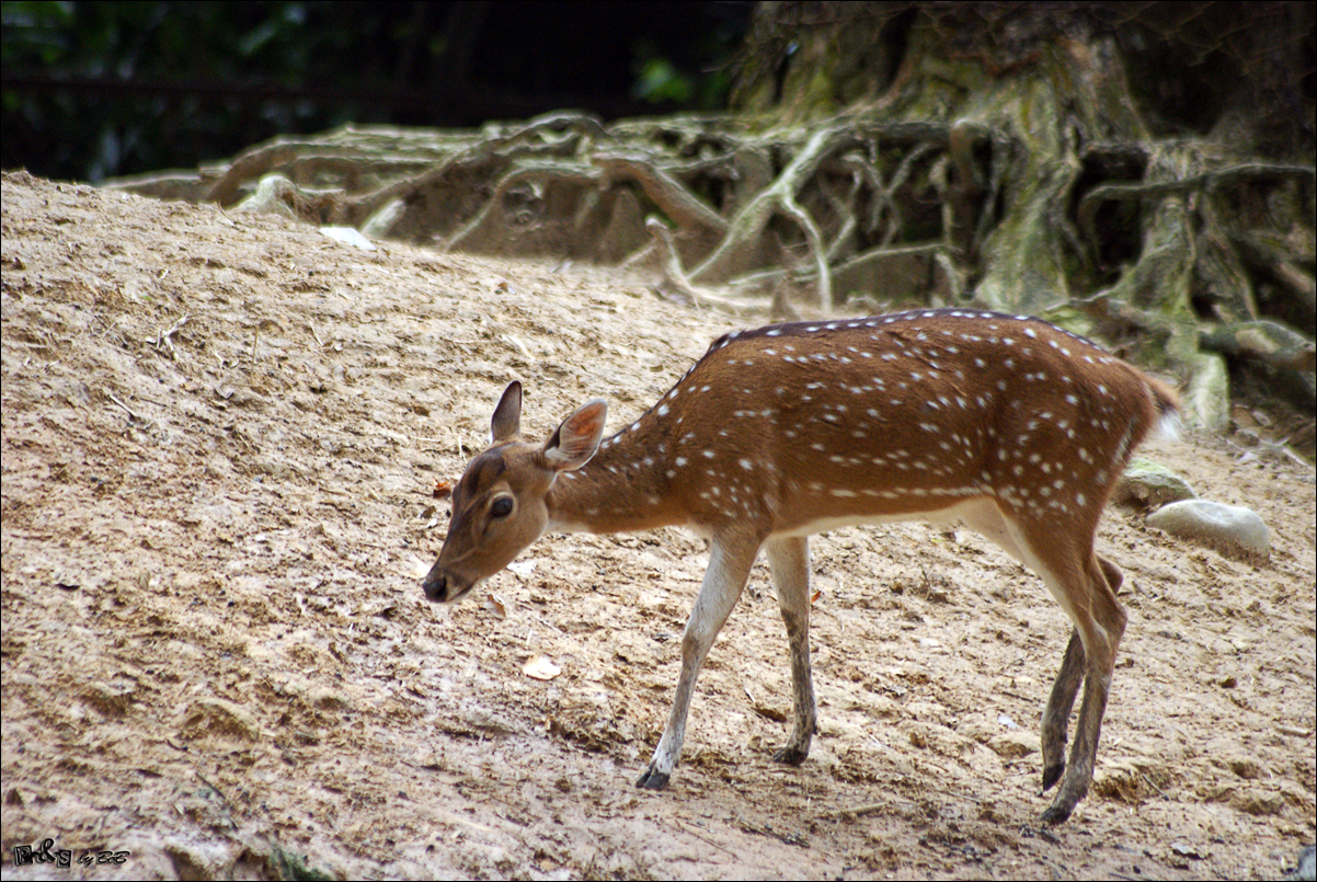 Rusa Bintik (in Malay) at Zoo Negara, Malaysia.